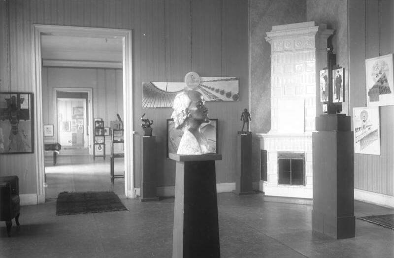 Die Eröffnung der grossen Berliner Kunstausstellung im Schloss Bellevue! Ein Blick in die grosse Berliner Kunstausstellung. Im Vordergrund der Raum der Abstrakten mit ihrer Ausstellung alte und neue Form.